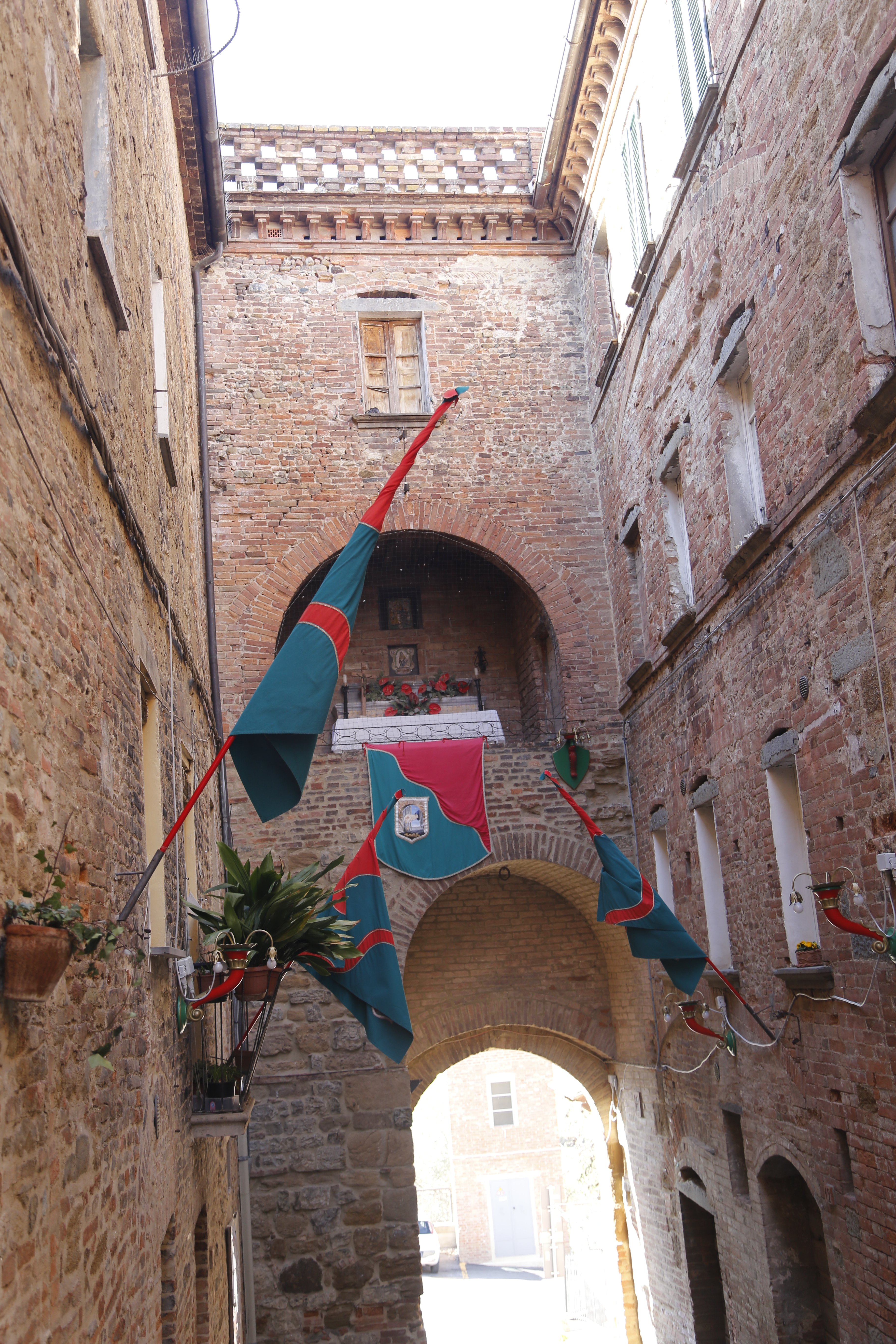 Torrita di Siena, vista interna della Porta a Pago